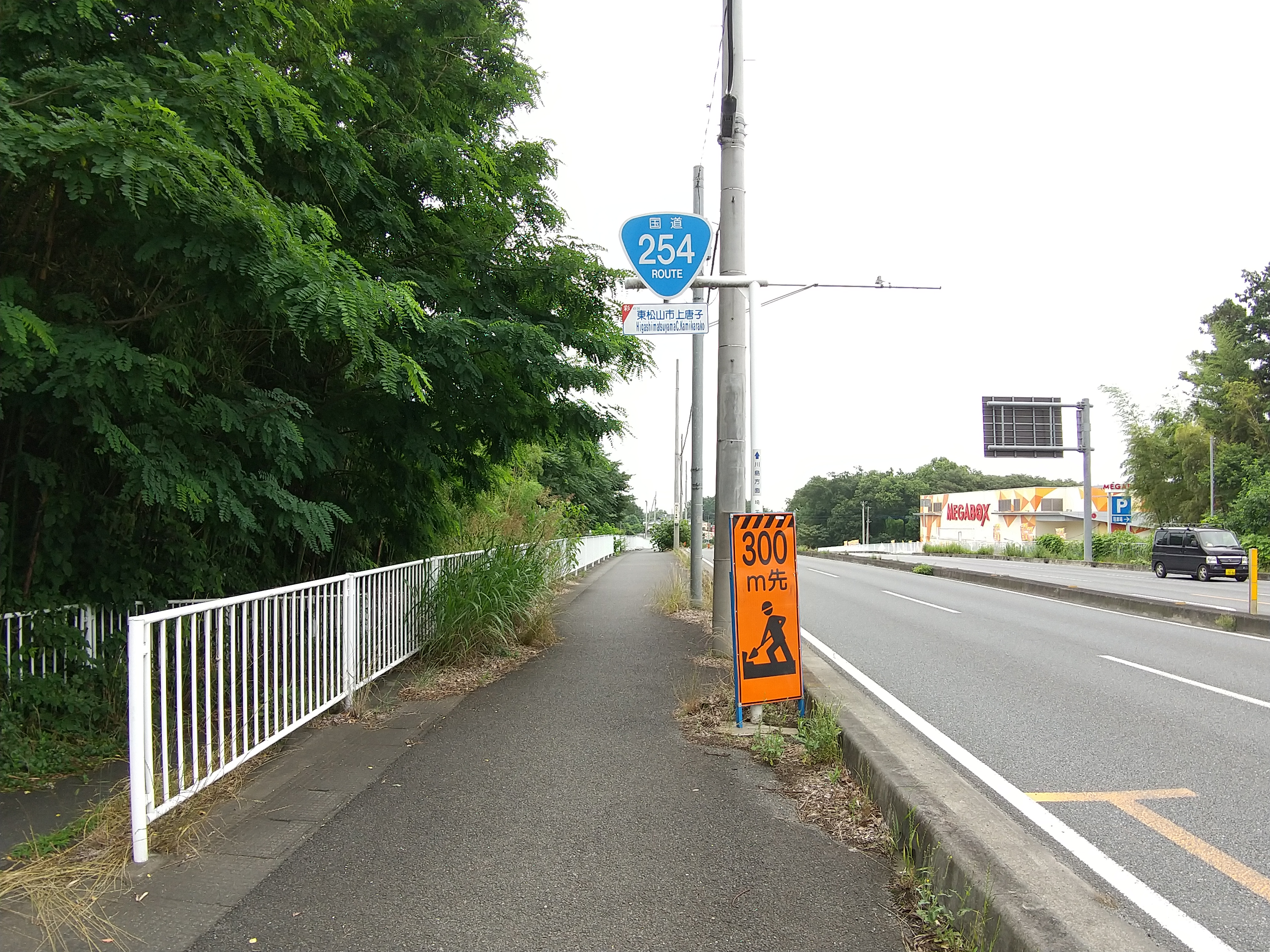 上唐子付近にて